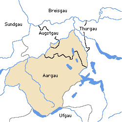 Der Aargau im 8. Jahrhundert, selbst erstellt durch Voyager